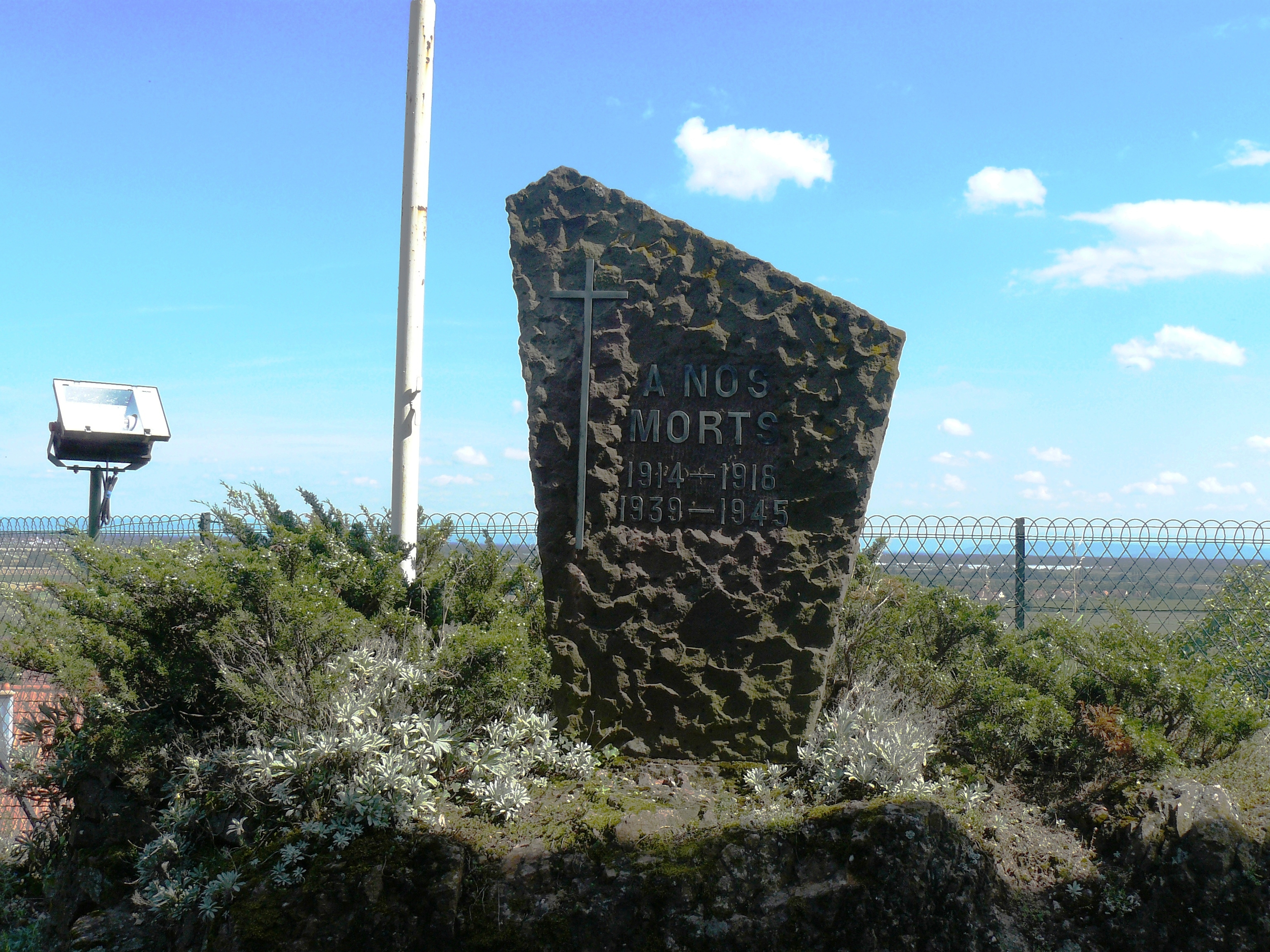 Monument aux morts de Dieffenthal